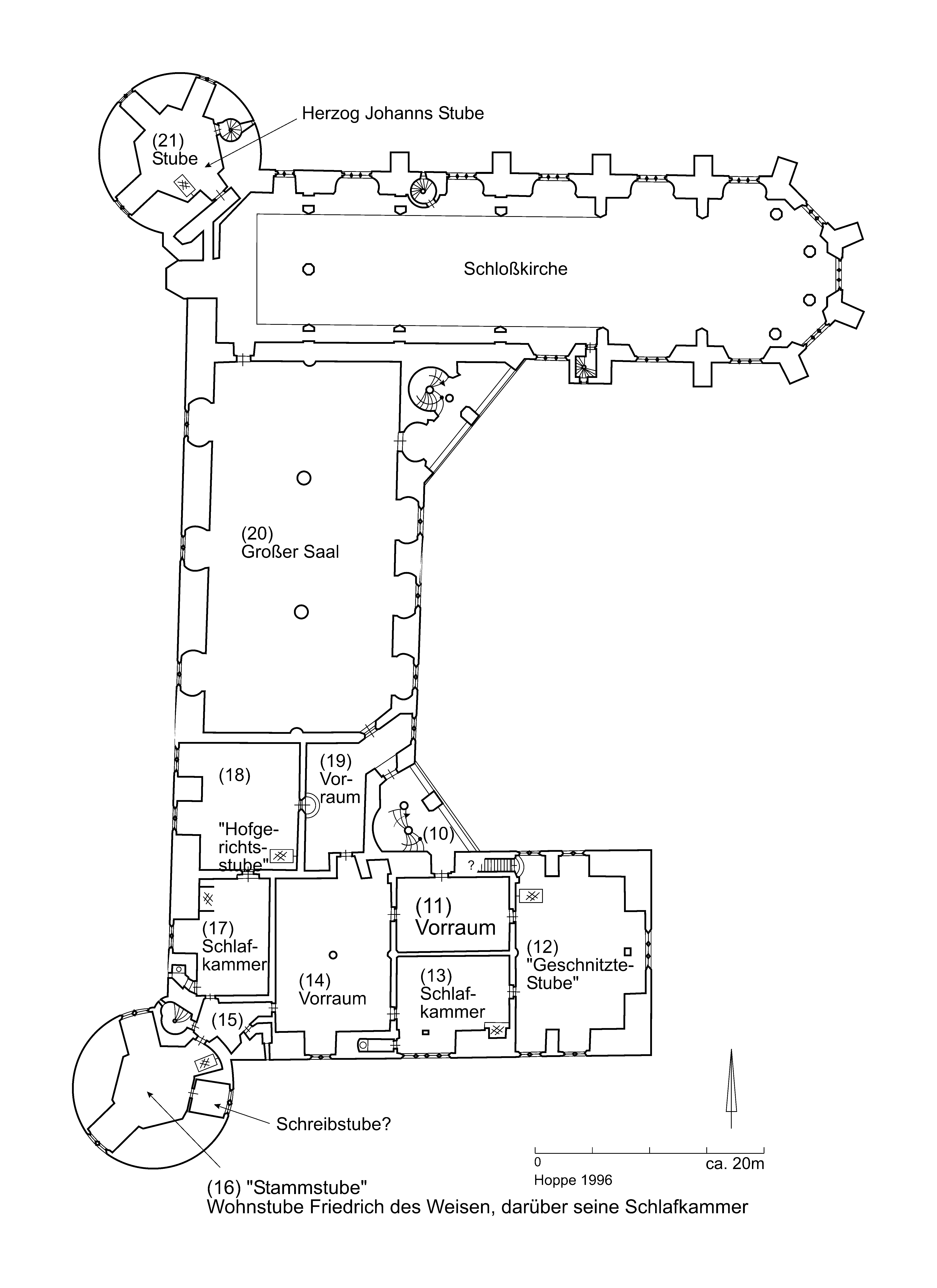 Erstes Obergeschoss. Rekonstruktion der funktionalen Raumstruktur des Wittenberger Schlosses ab 1489 (Nach: Stephan Hoppe: Die funktionale und räumliche Struktur des frühen Schlossbaus in Mitteldeutschland. Köln 1996)